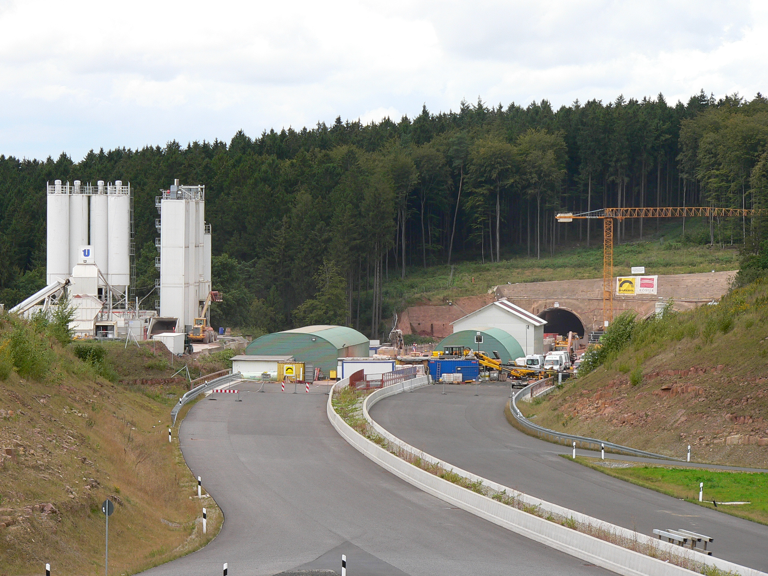 Bundesautobahn A44: Baustelle Tunnel Hirschhagen Südostportal bei Hessisch Lichtenau, Hessen, Deutschland.